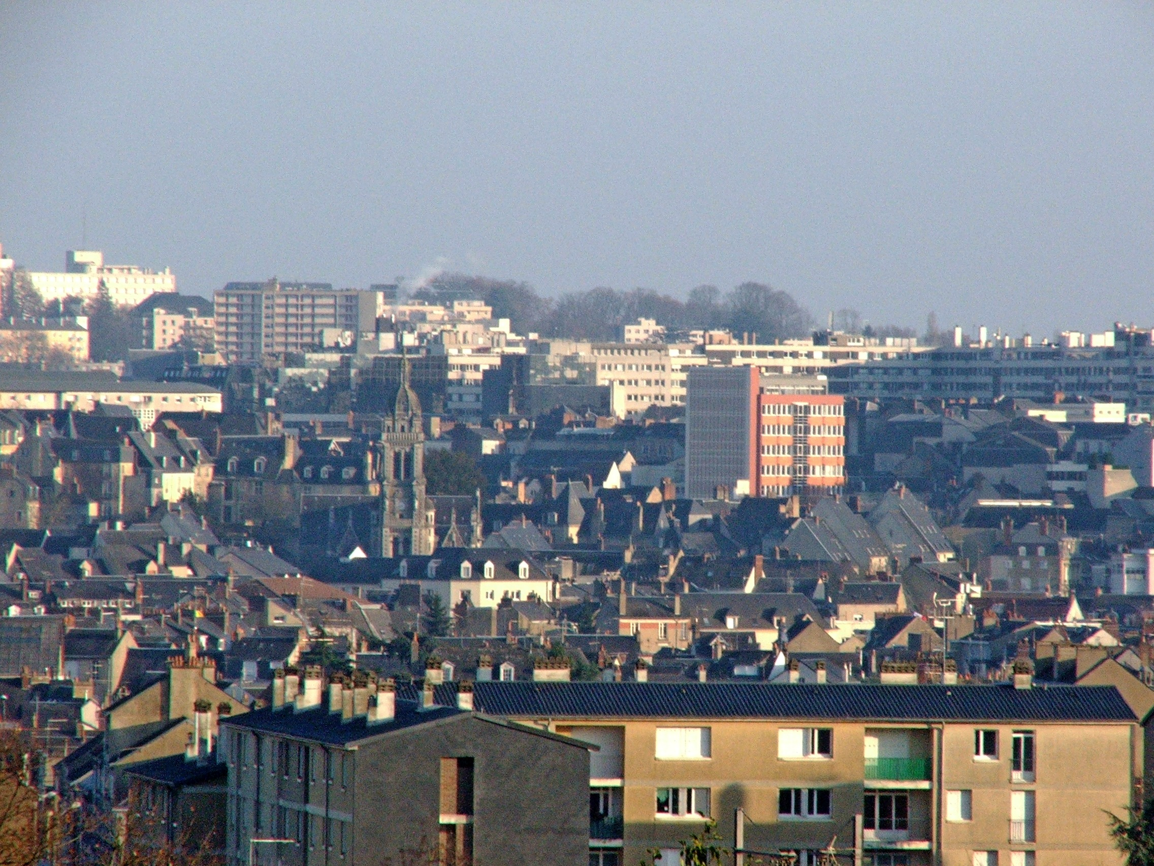 Vue sur le secteur de l'eglise Saint-Benoît.